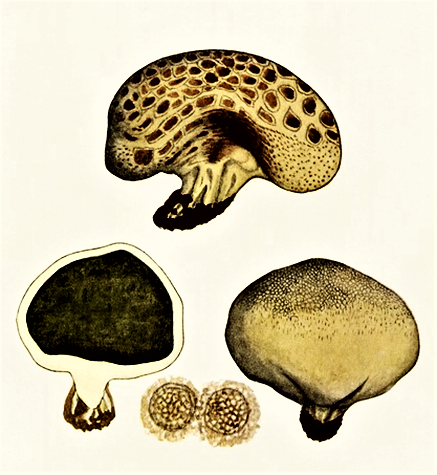 Giacomo Bresadola: Scleroderma vulgare (Hornem., 1819), heute (Scleroderma citrinum Pers. (1801)